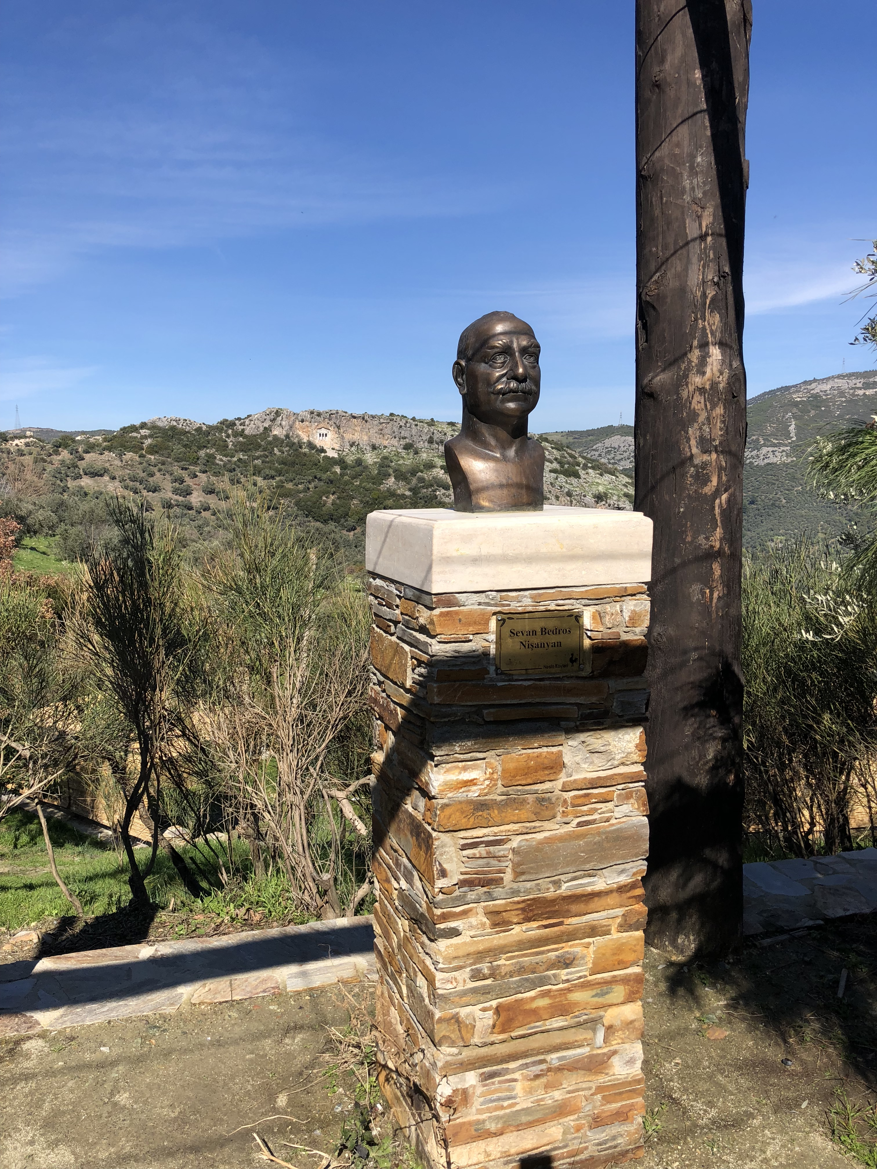 Nesin Matematik Köyü'nde yer alan Sevan Nişanyan büstü.